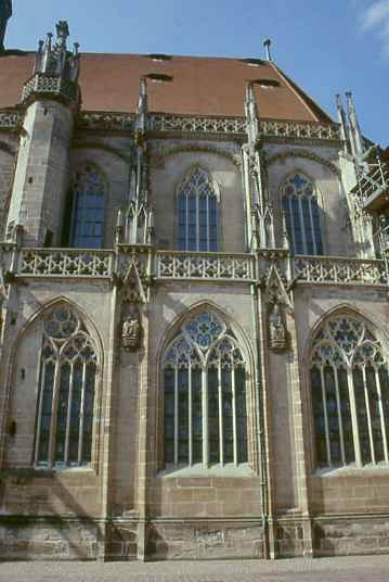 Schwäbisch-Gmünd, Heilig-Kreuz-Münster. Chor von Süd. Entstanden 2. Hälfte 14. Jh.